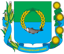 Герб Олександрівського району